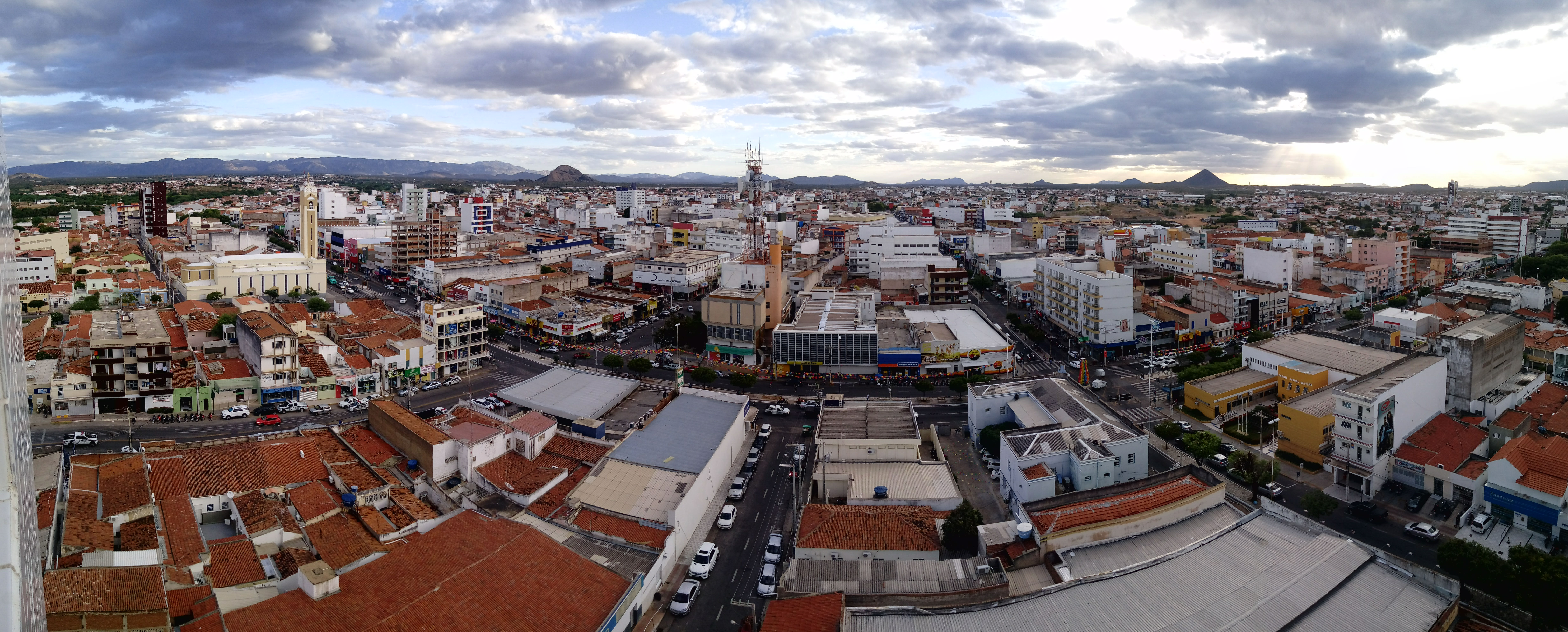 Panorama do Centro de Patos obtido a partir do Edifício Milindra Empresarial em Junho de 2017.